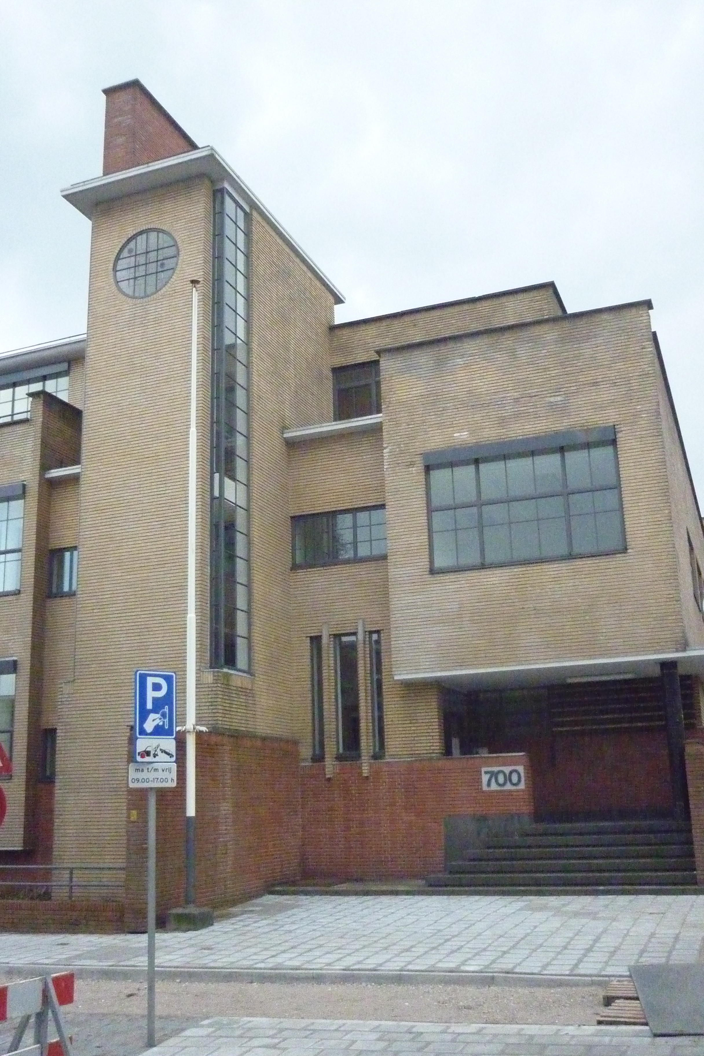 Het 700 Monument in den Haag